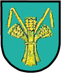 Herb Wilkowic (gmina Zbrosławice, powiat tarnogórski, województwo śląskie, Polska)